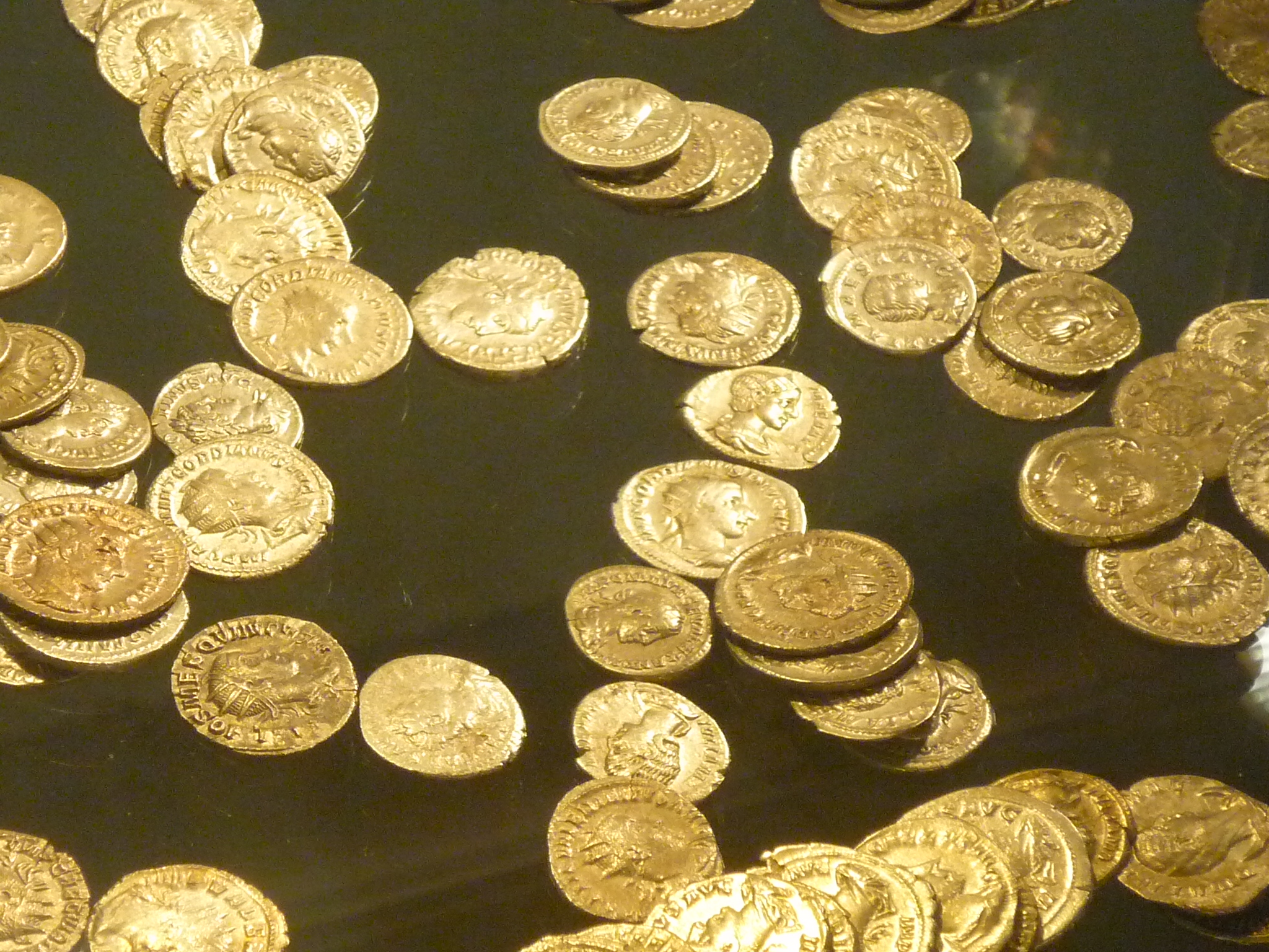 Münzen aus den Münzschatzfund in Tulln, ausgestellt im römischen Museum Tulln